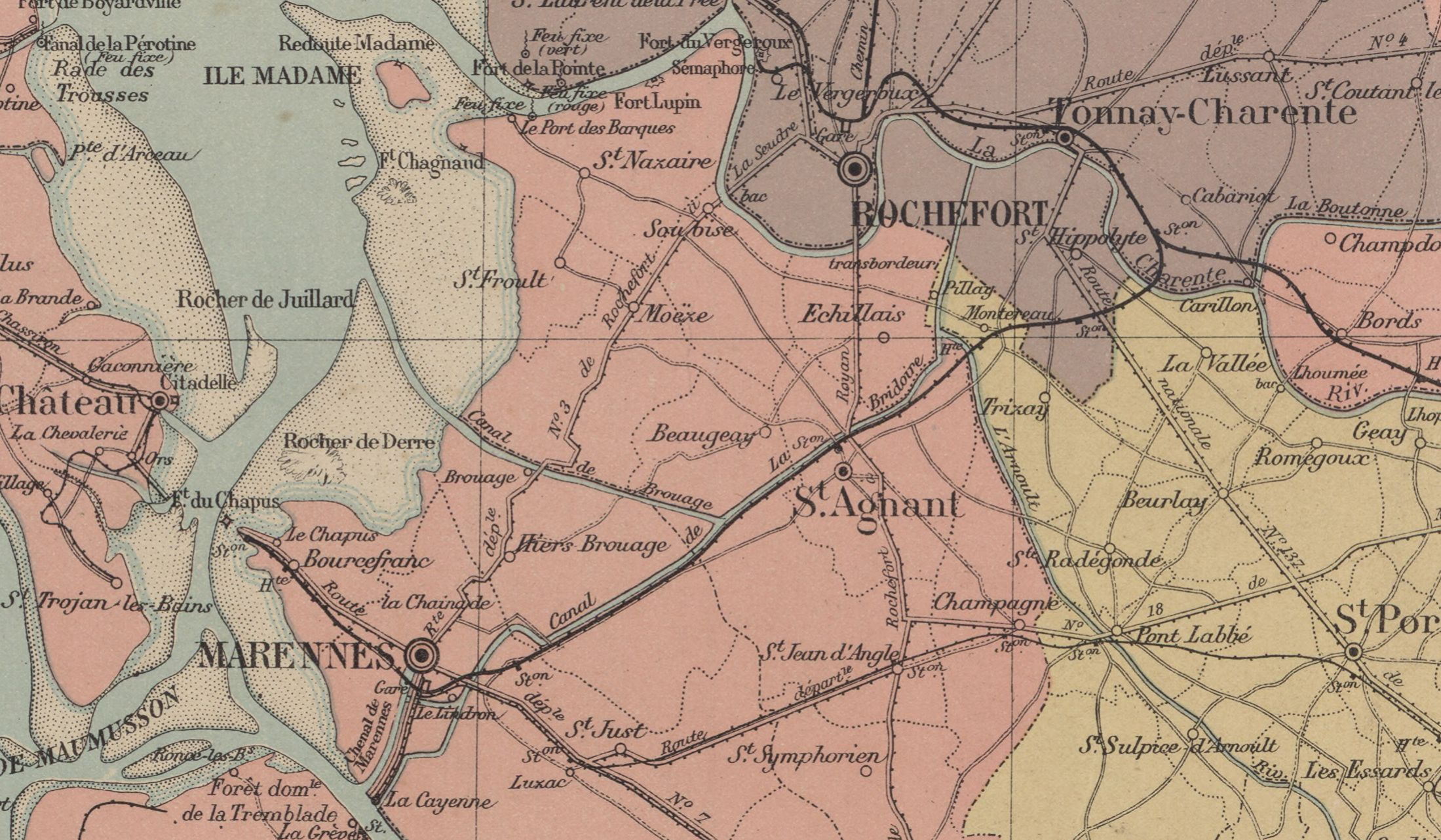 Extrait de la Carte du département de la Charente-Inférieure / dressée par E. Lacroix ; ingénieur civil, mise à jour par J. Charrier, conducteur des ponts et chaussées... 1910 , montrant le tracé de la ligne de chemin de fer de Cabariot au Chapus.